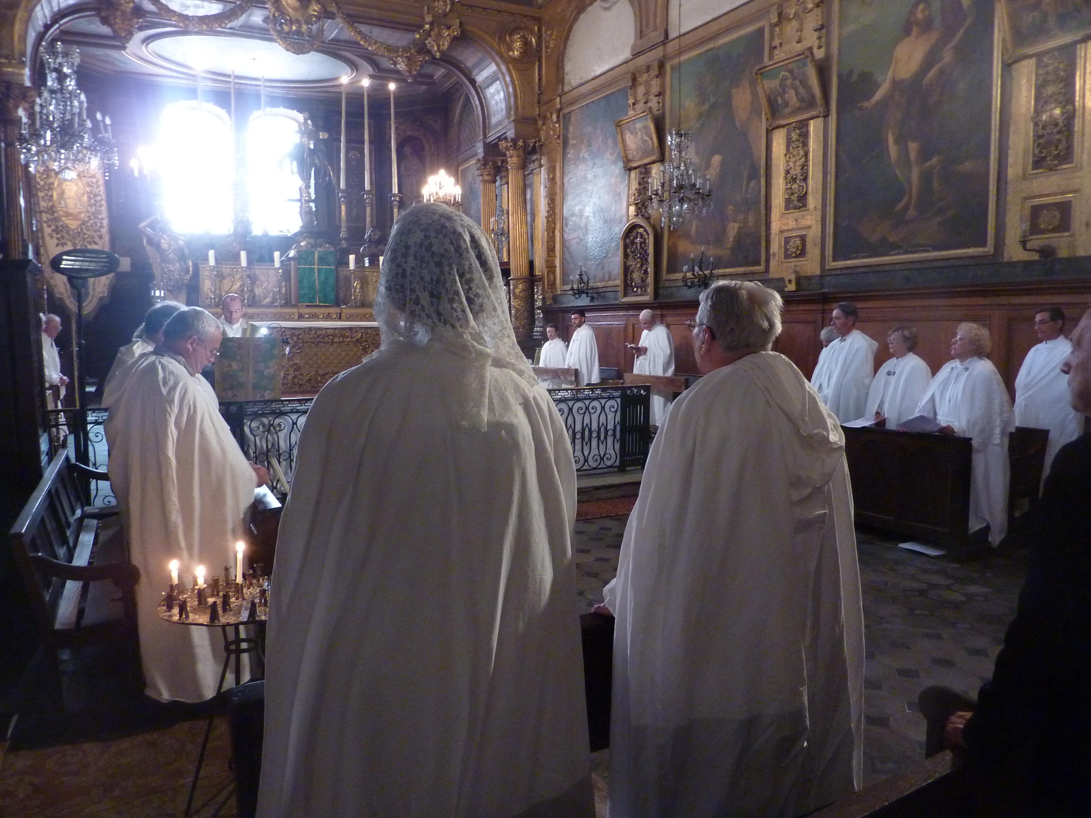 Messe à l'intérieur de la chapelle.